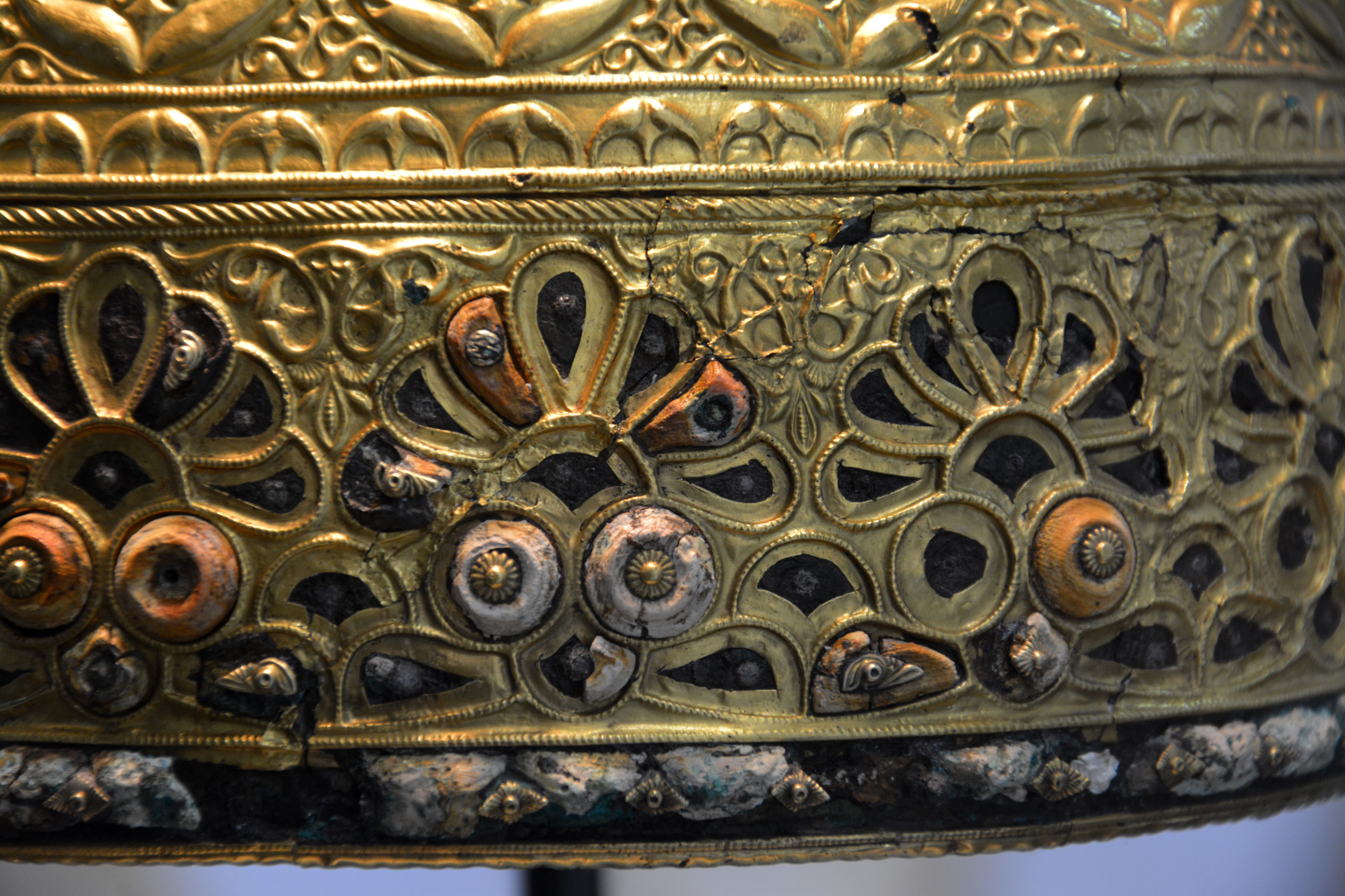 Casque celte et gaulois d'apparat dit casque d'Agris; à coque en fer, recouverte de bronze décoré de feuilles d'or repoussées, rivetées (rivets en argent à tête sertie d'un fleuron d'or), argent et éléments décoratifs de corail sertis dans les alvéoles de certains motifs. il a été découvert à Agris, en Charente dans la grotte des Perrats en 1981 ; probablement fabriqué par des artisans de l'ouest de la gaule. C'est l'une des œuvres majeures de tout l'art gaulois. Il est conservé au musée d'Angoulême. Il est daté du second âge du fer, vers 5ème siècle avant Jésus-Christ. L'or provenait sans doute du Limousin ou du Périgord. Des motifs réalisés avec du fil d'or bouleté ornent la pièce mobile qui protégeaient la joue. Le motif principal du pare-joue représente un serpent cornu à longue tête, le monstre des enfers, attribut du dieu gaulois Cernunos. Ce casque n'a probablement eu qu'un usage cérémoniel ou est simplement une offrande. Il n'a pas été trouvé dans une sépulture mais dans une grotte-sanctuaire, brisé volontairement (plusieurs parties ont été arrachée et le timbre a été enfoncé par un coup violent).